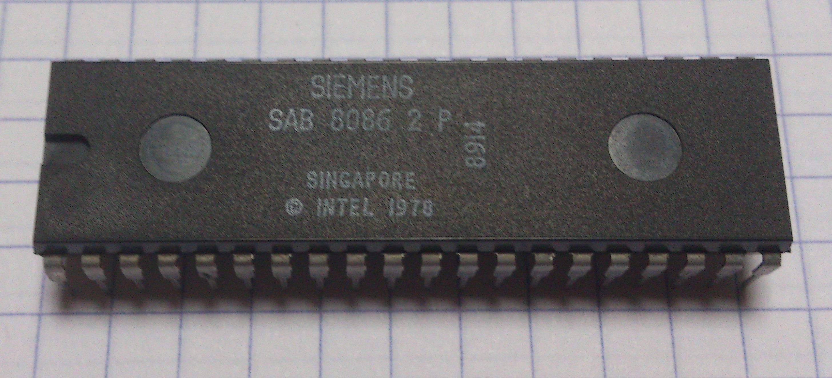 Processeur intégré dans le Amstrad PC1512 cadencer à 8MHz. Celui-ci dispose de la même architecture que le Intel 8086 mais développer par Siemens.